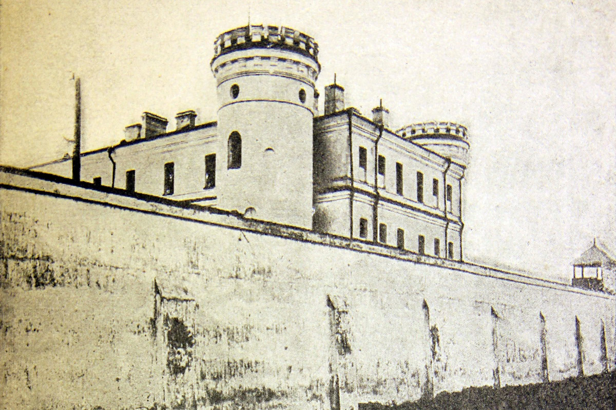 Беларуская (тарашкевіца): Менск (Miensk), Пішчалаўскі замак (Piščałaŭski zamak)